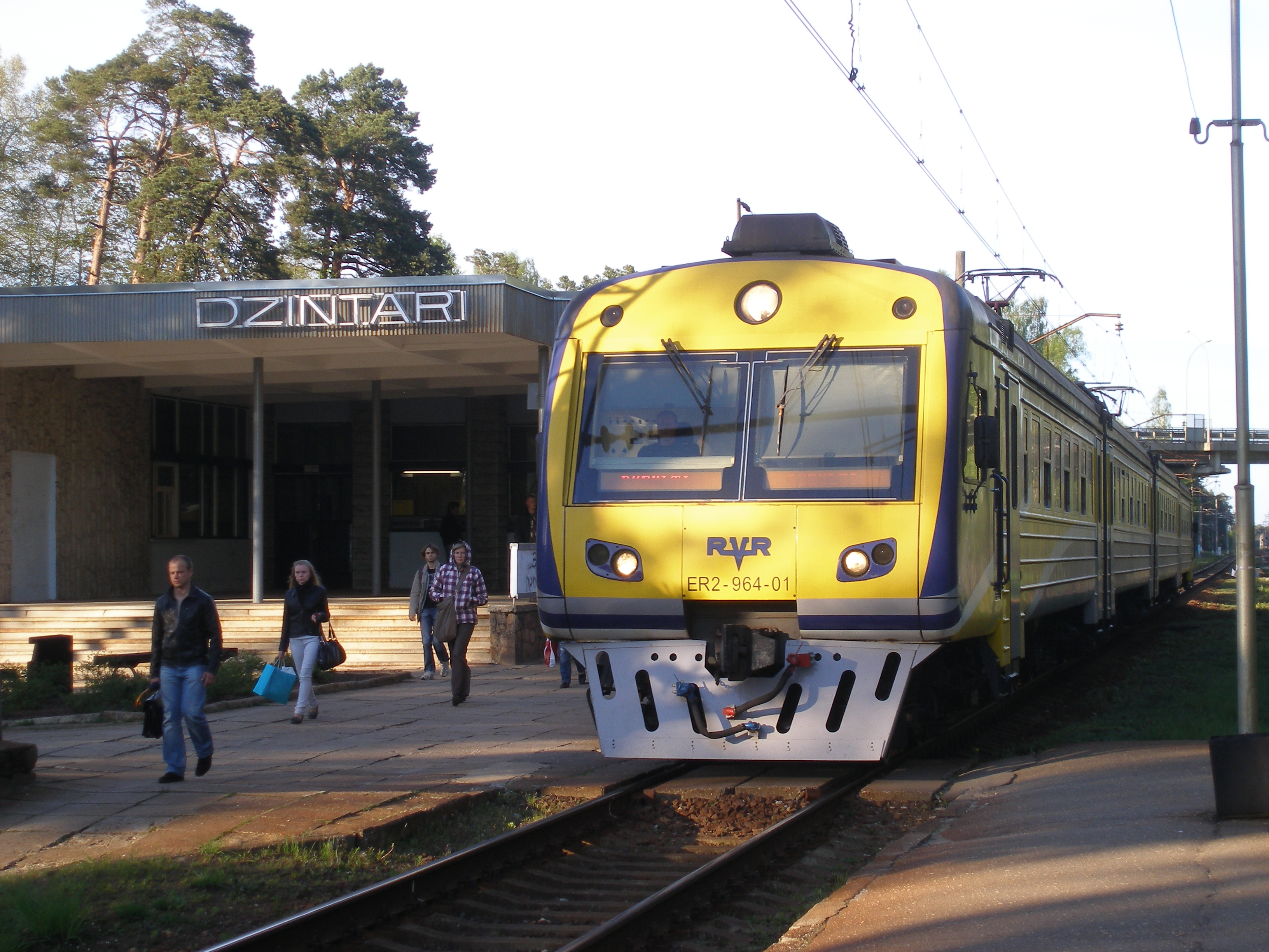 Elektrovilciens ER2-964 atiet no Dzintaru stacijas.